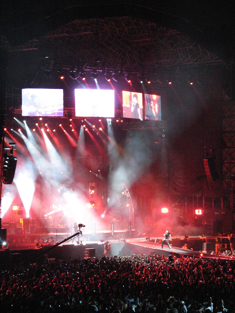 ¡¡¡¡¡Qué difícil es tomar fotos de un concierto tan lejos!!!!! Martha había esperado mas de 11 años para volver a verlos, y me dio mucho gusto poder acompañarla esta vez. Ya también había ido con ella a ver a Bunbury cuando vino solamente al Metropolitan. // Presentación en vivo de 'Héroes del Silencio' en 'Foro Sol', México D. F. (9 de octubre de 2007).